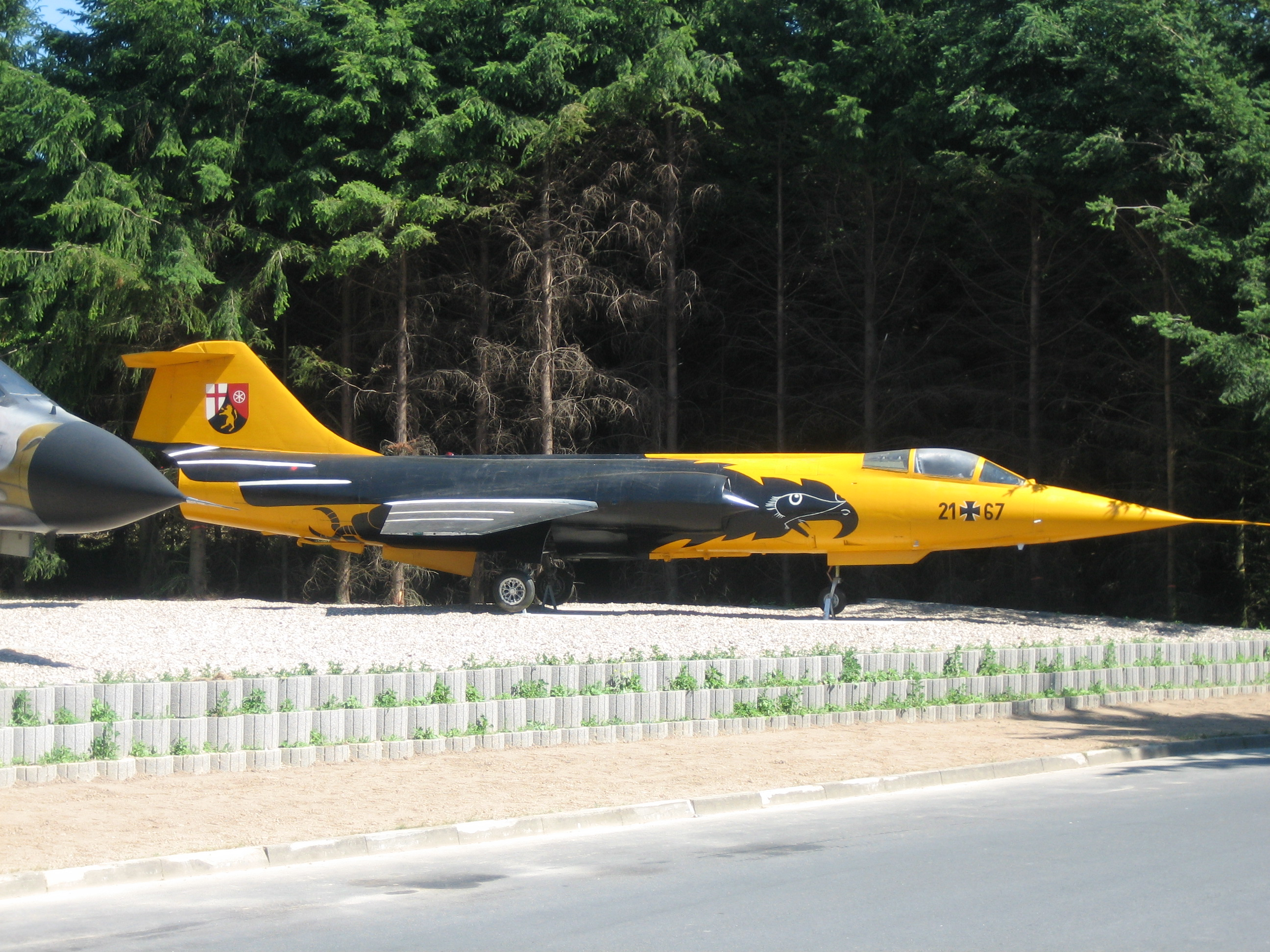 F104 JaboG 33 letzter Flug